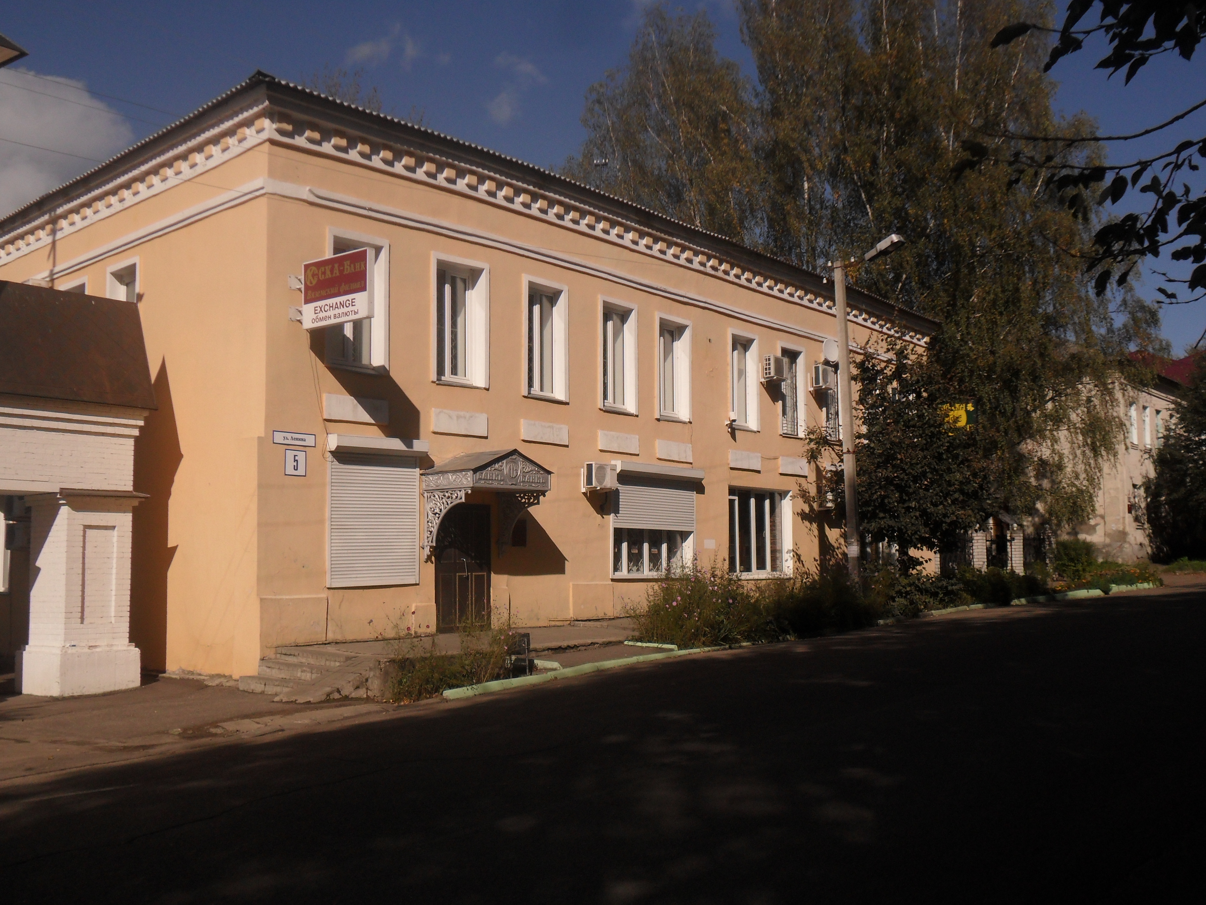 Памятник архитектуры регионального значения. Жилой дом 1-й половины XIX века.